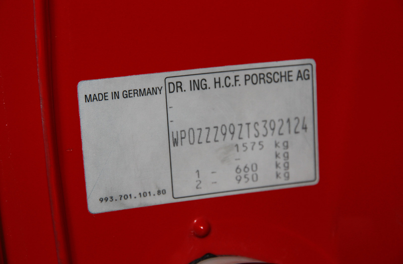 1996 Porsche 911 993 GT2